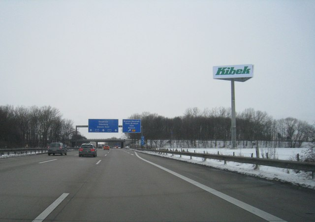 A1 - Kreuz 57 - Bremen / Brinkum